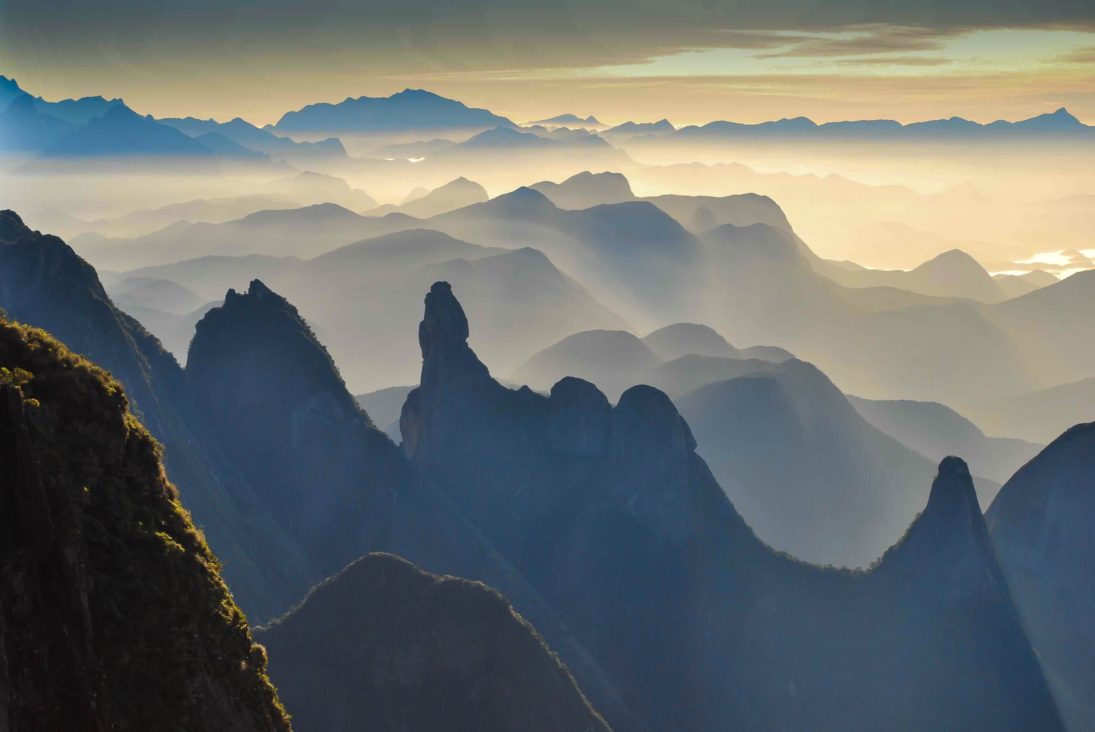 Parque Nacional da Serra dos Orgãos